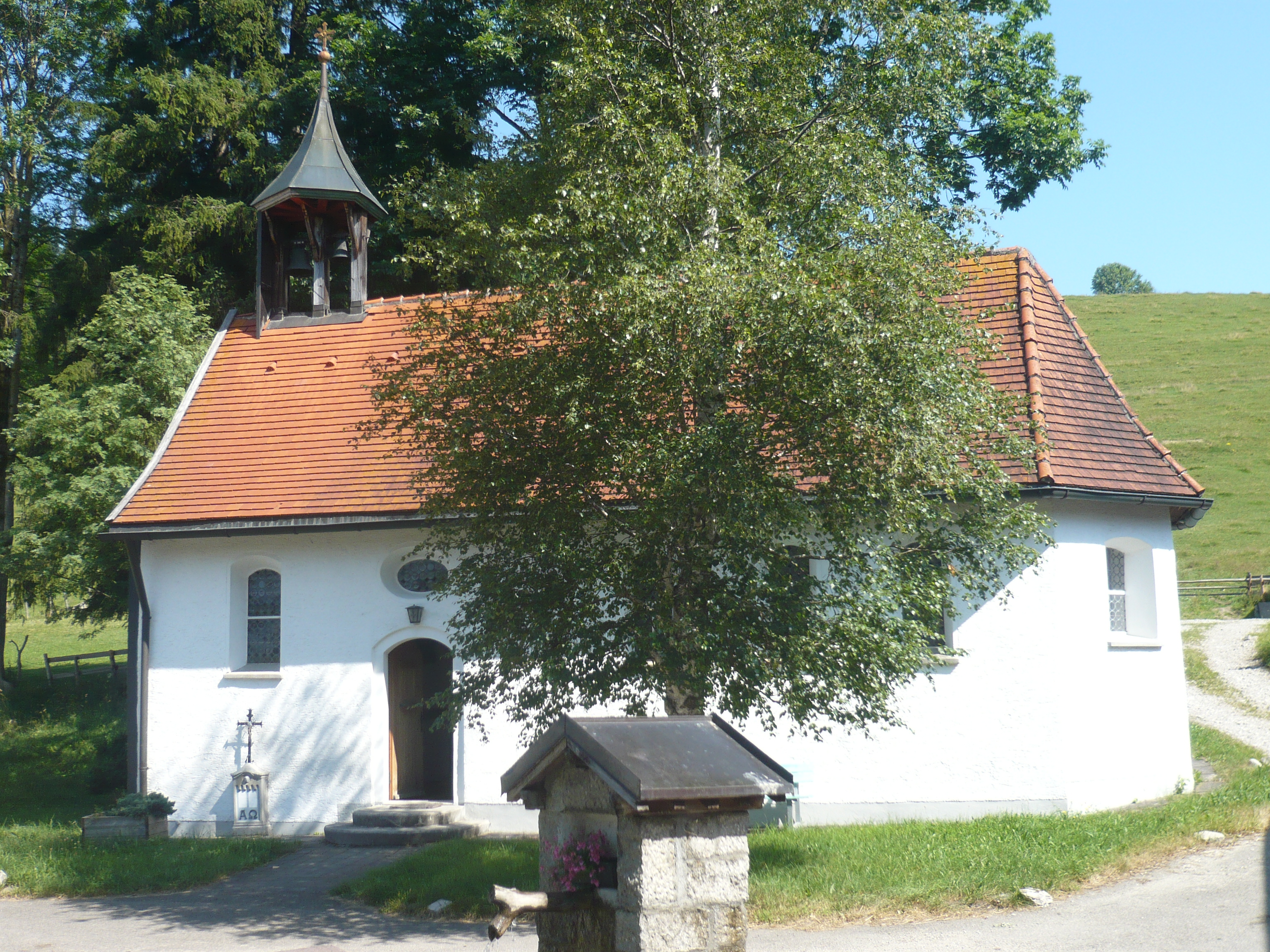 Kapelle St. Anna in Pfronten-Rehbichel, Ostallgäu